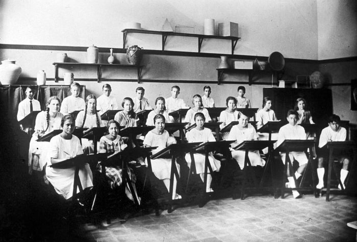 Repronegatief. Tekenles op de christelijke M.U.L.O. Gang Mandjangan te Batavia, Java